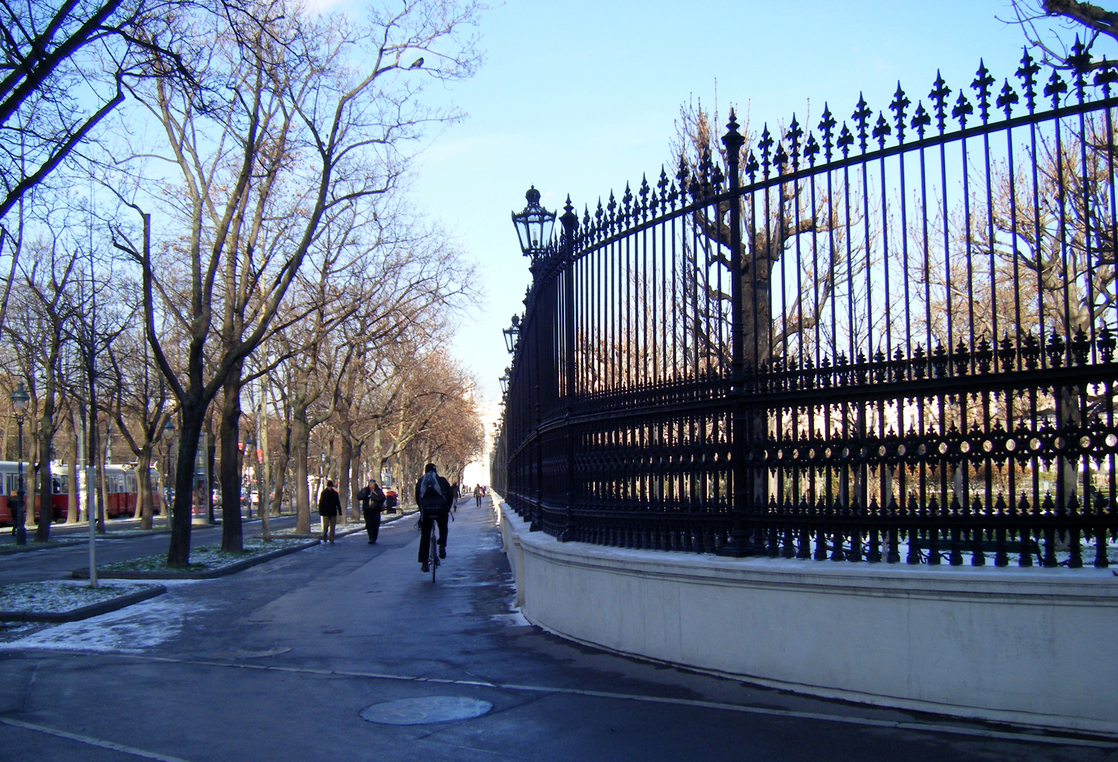 Volksgarten